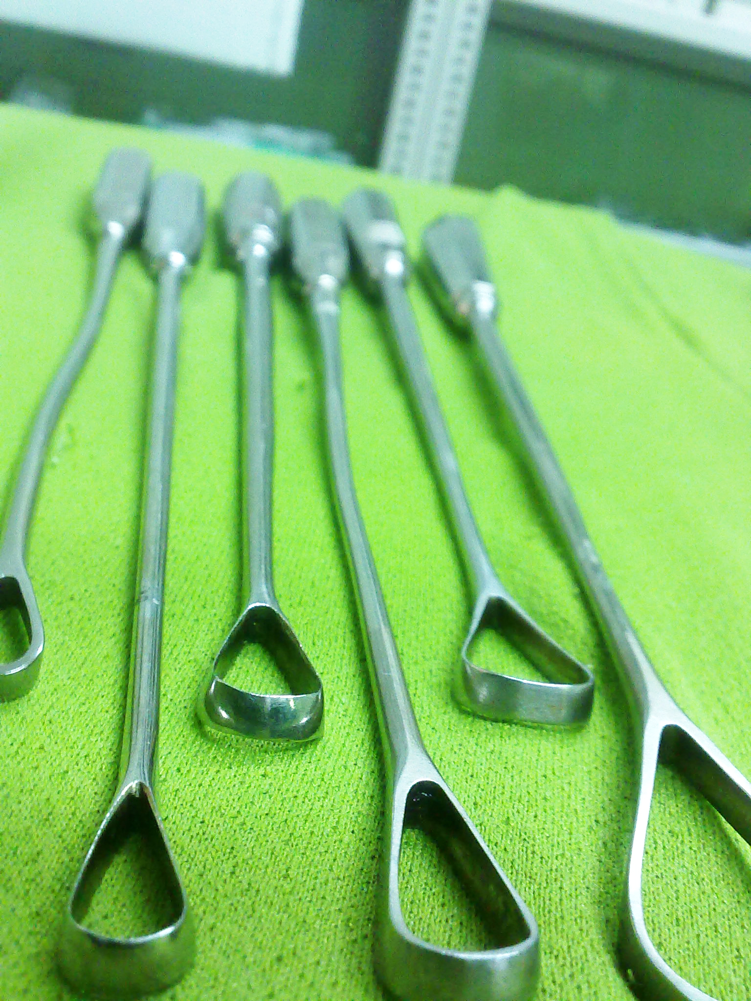 کورت رحمی : وسیله ای جهت تراشیدن آندومتر رحم و محتویات است . این وسیله بیشتر در ست کورتاژ دیده می‌شود . راس آن ممکن است کند یا تیز باشد .